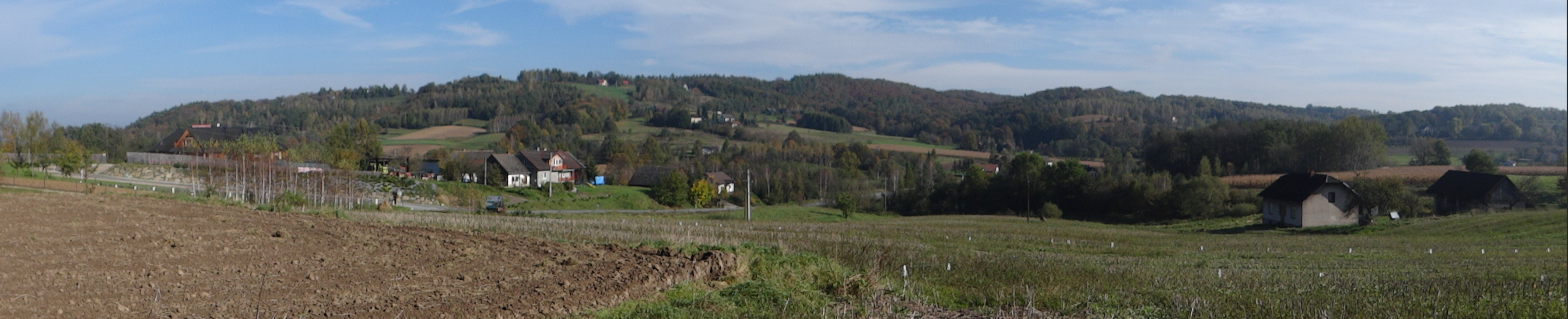 Zagórzany. Widok ogólny spod kościoła w Zagórzanach